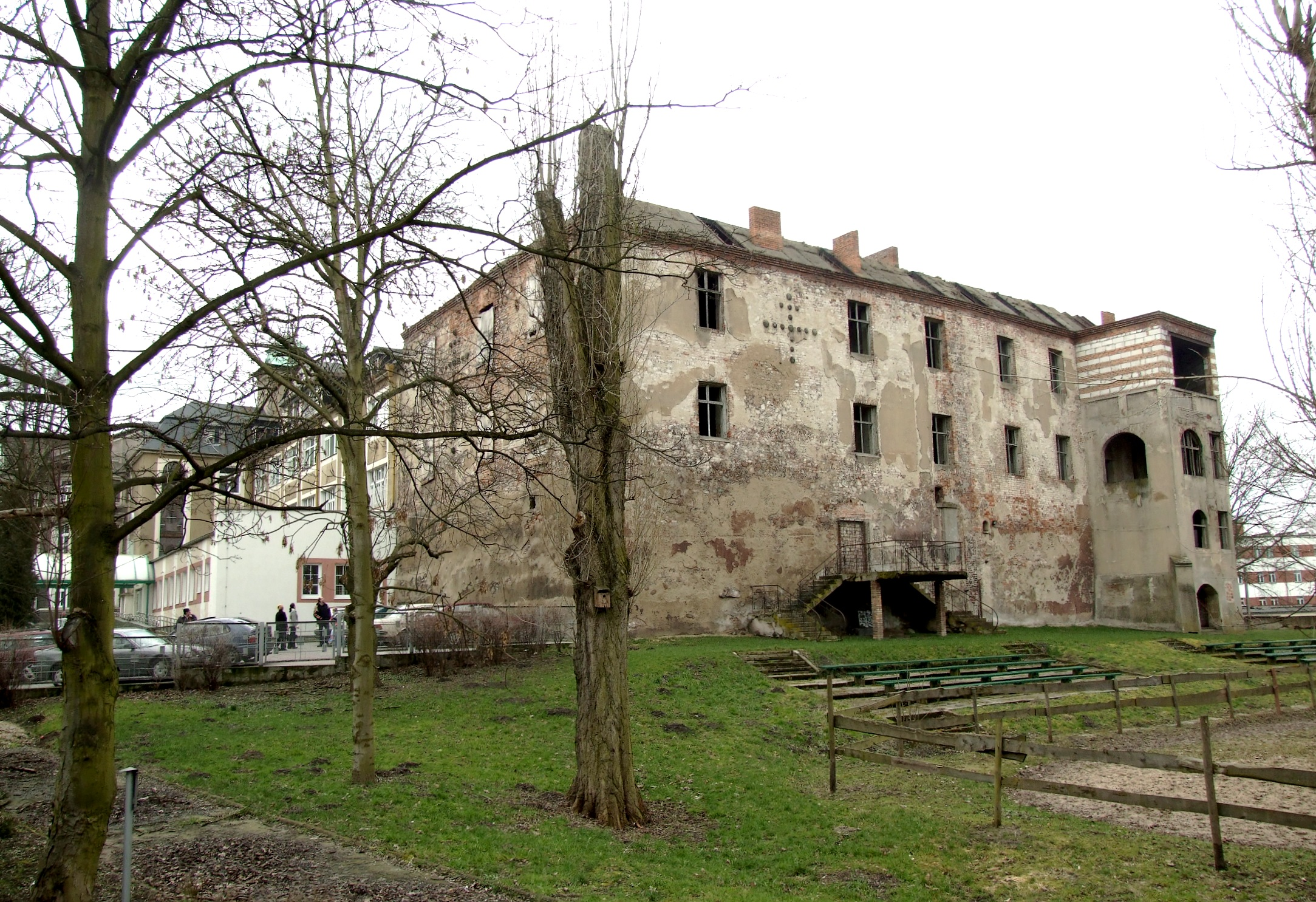 Zamek w Świebodzinie Autor: Mohylek 18:08, 8 March 2007 (UTC)